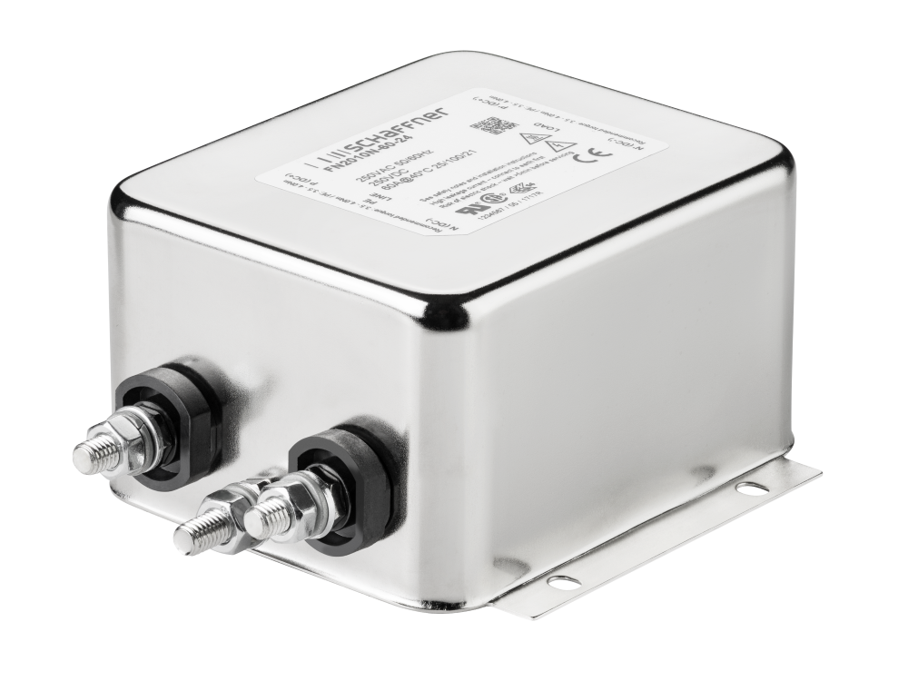 Schaffner EMV Filter mit integrierter Gleichtaktdrossel und EMI Kondensatoren.